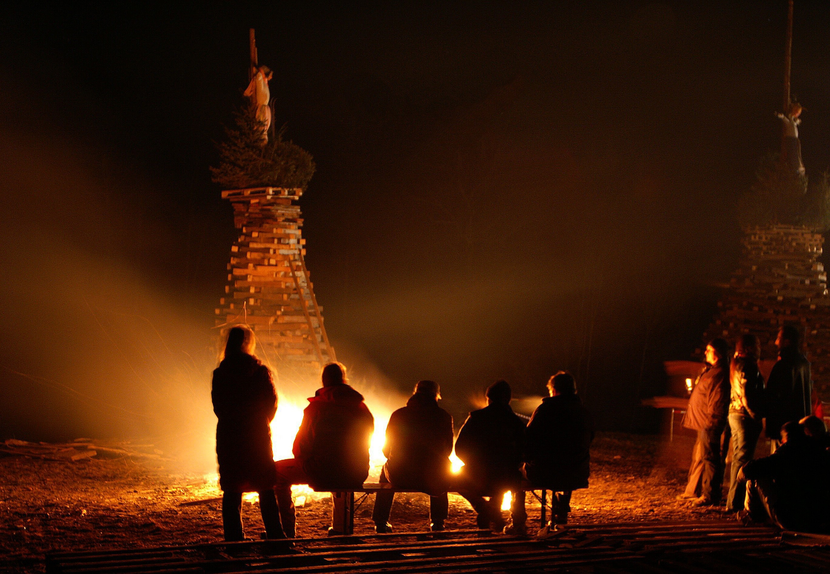 das traditionelle Funkenfeuer am Oberfallenberg in Dornbirn, Vorarlberg.